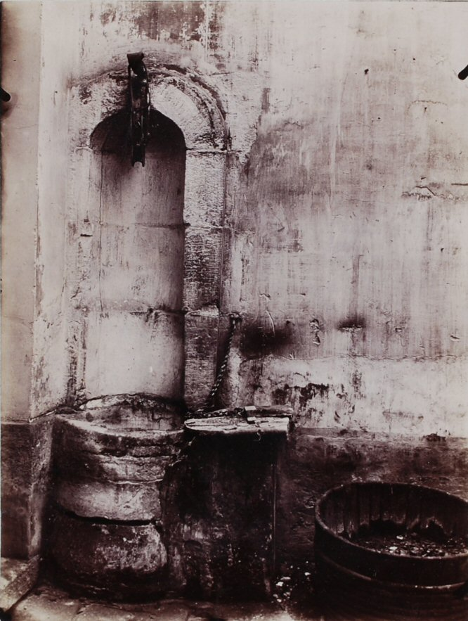 Puits au 11 rue de Savoie, Paris 6e, France.